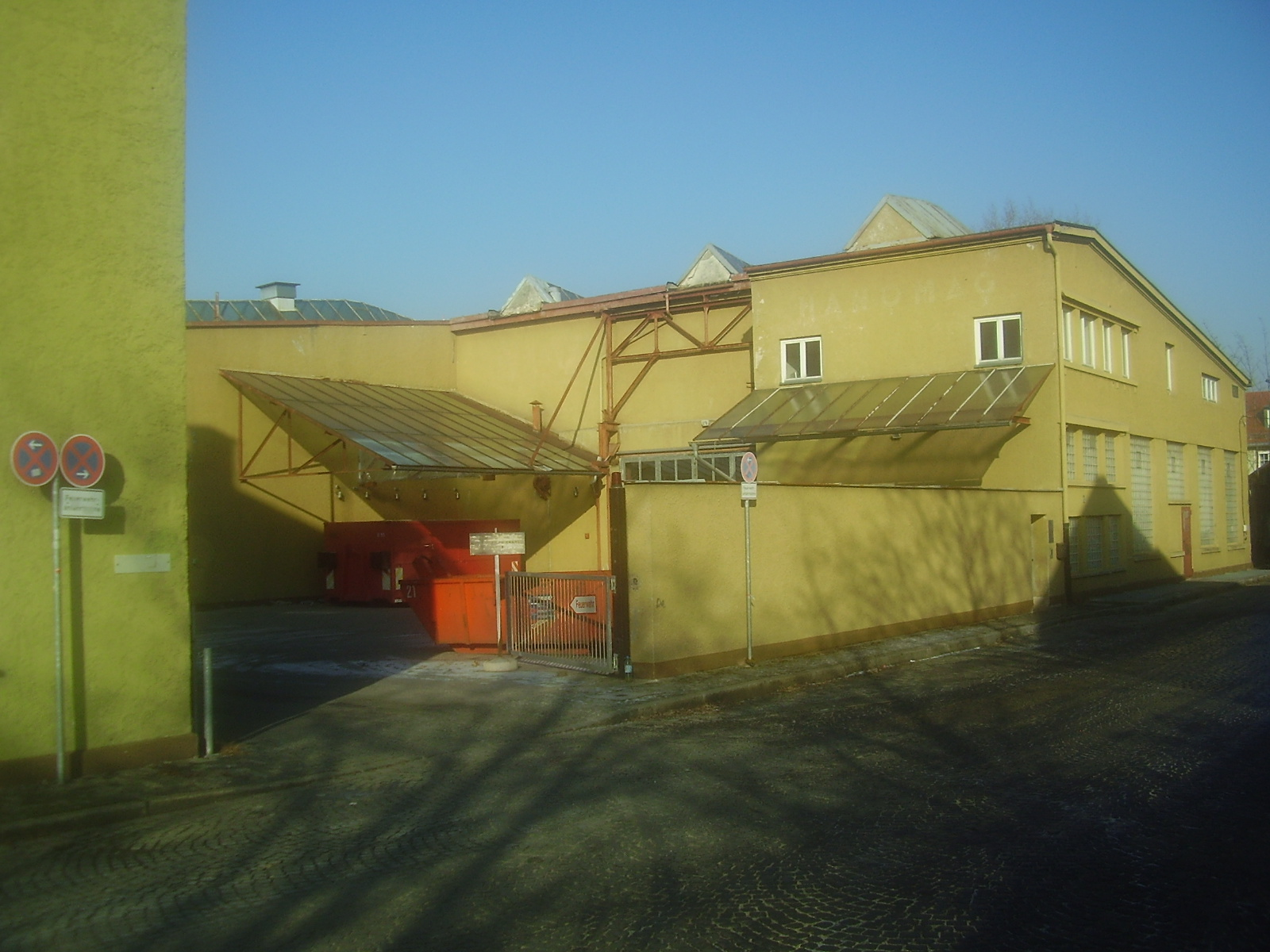 provisorische Unterbringung der Abteilung Stadtmitte, Freiwillige Feuerwehr München